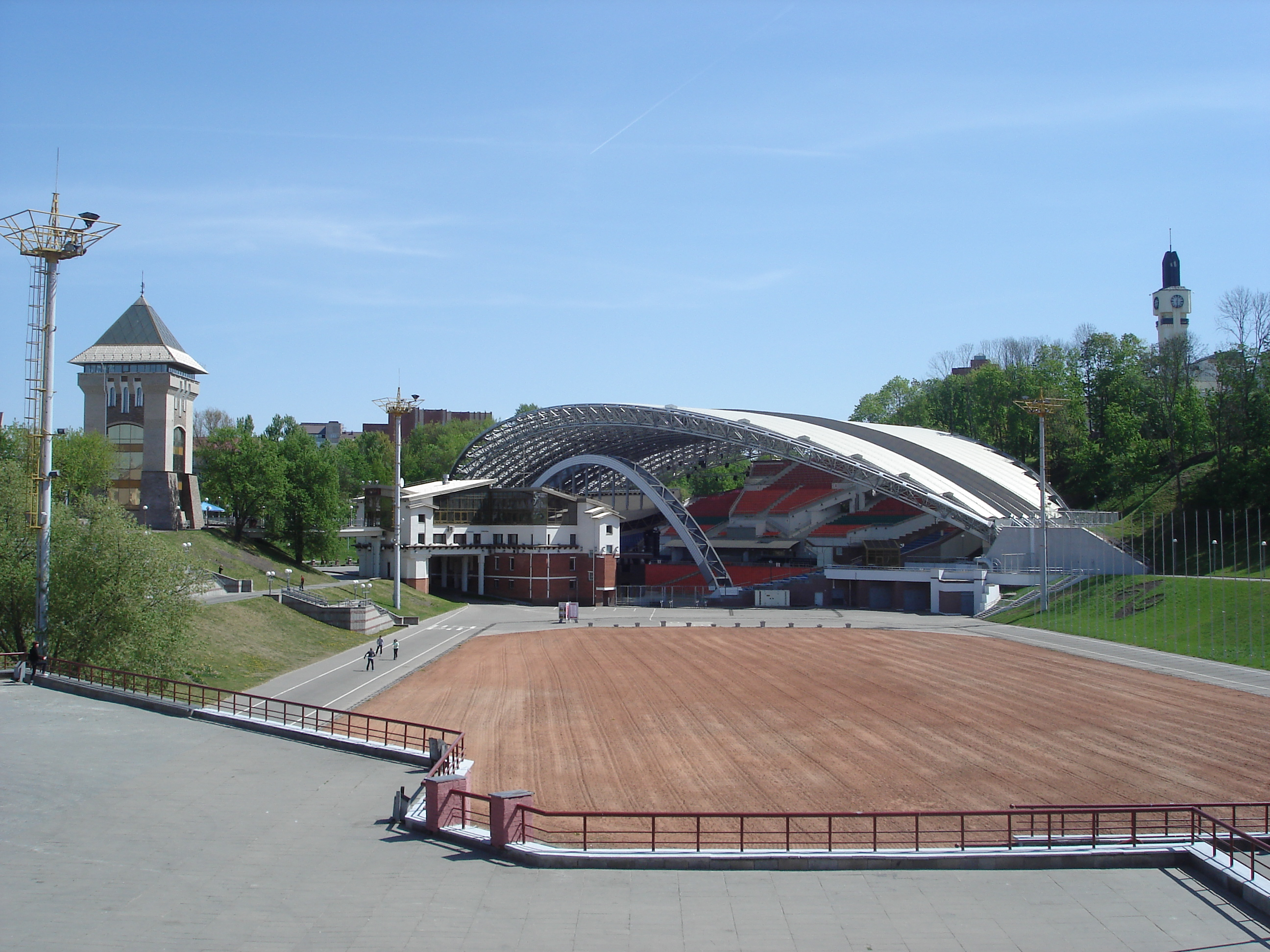 Летний Амфитеатр в Витебске. Проводится Славянский базар